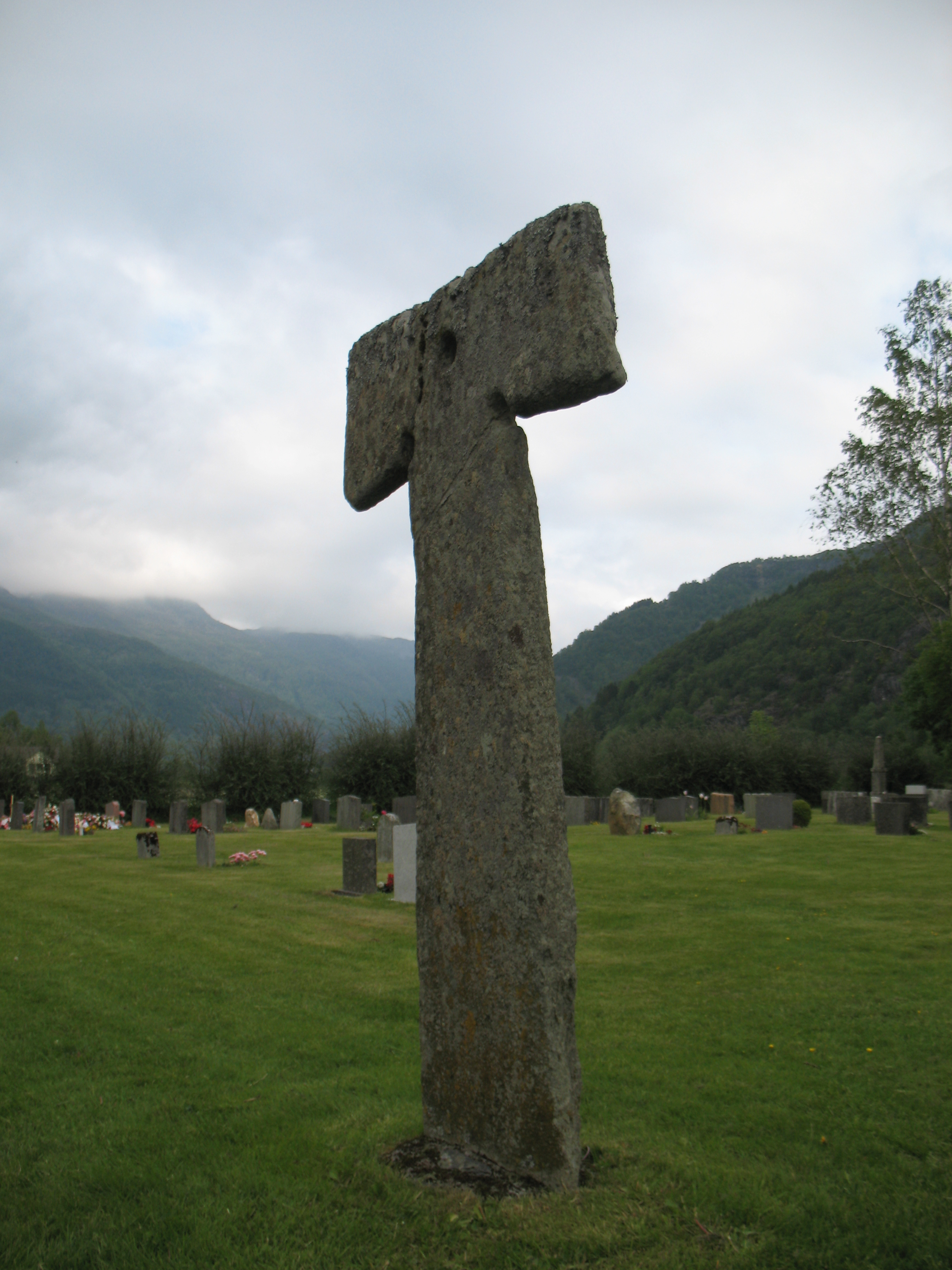 Funnen i kyrkjegardsmuren i 1905. Gravminne, tidlegkristen form.